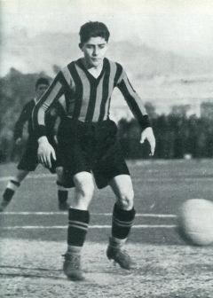 Giuseppe Meazza a 17 anni con l'Inter